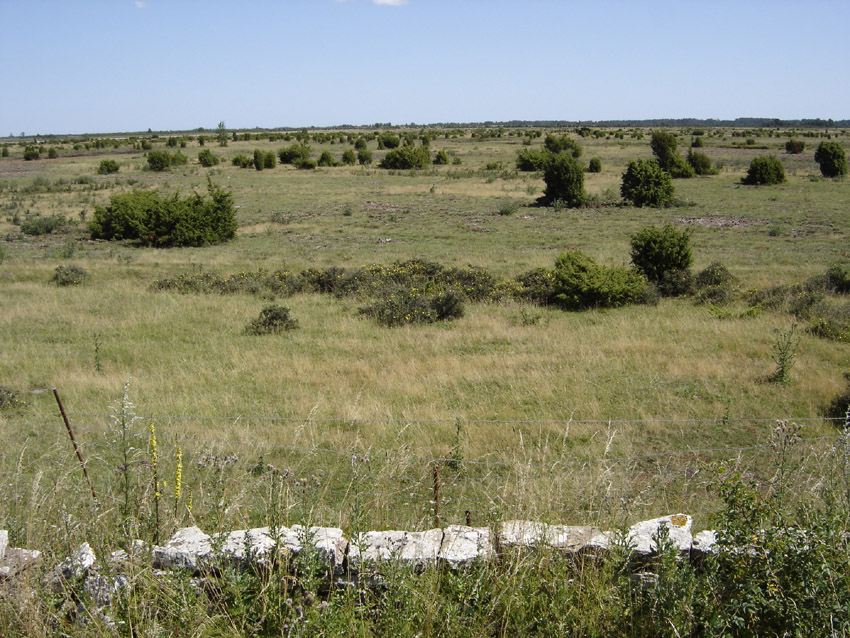 Paysage du sud de l'île Ö–land